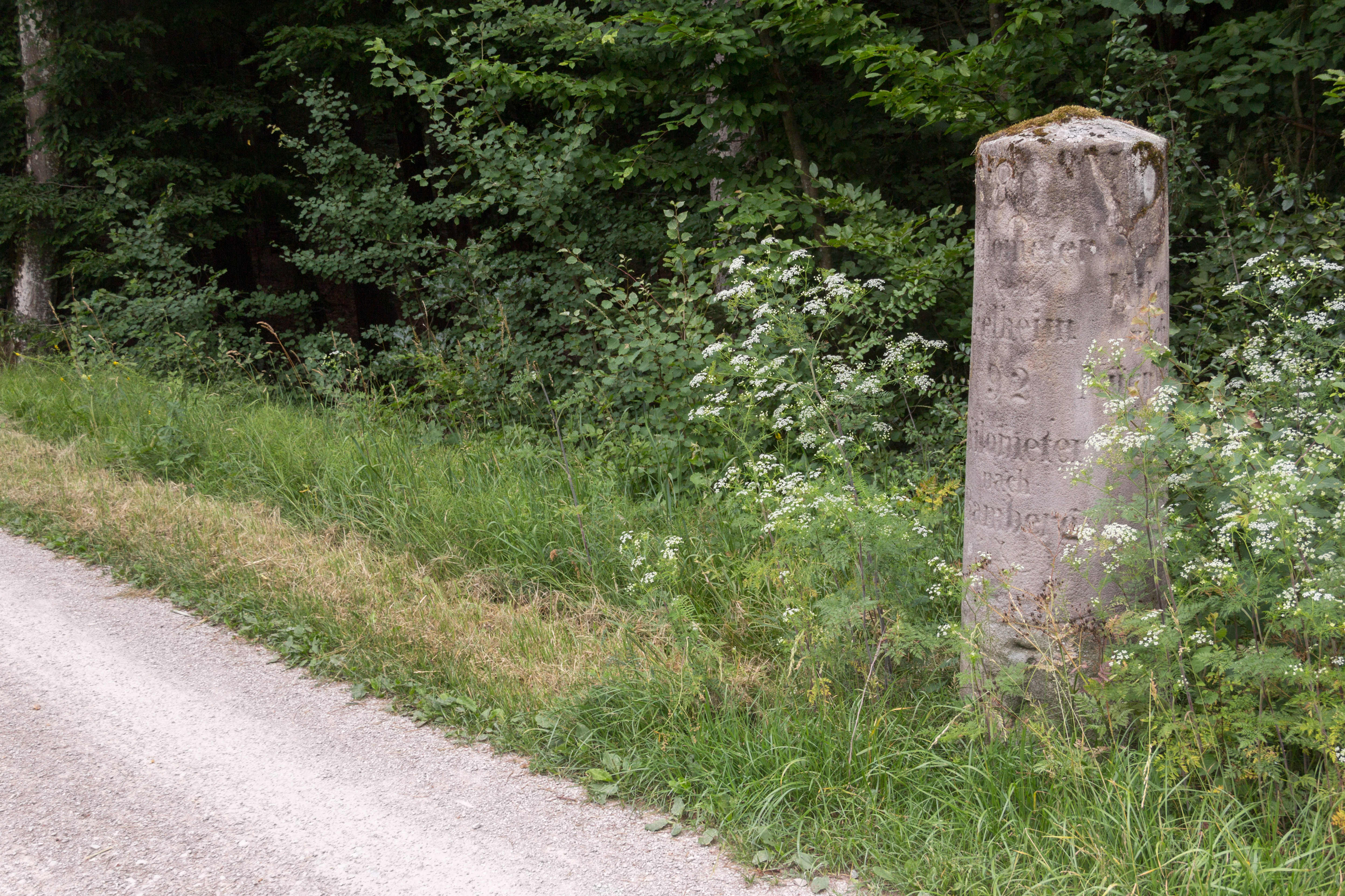 Ludwig-Donau-Main-Kanal, Kilometerstein, Rasch